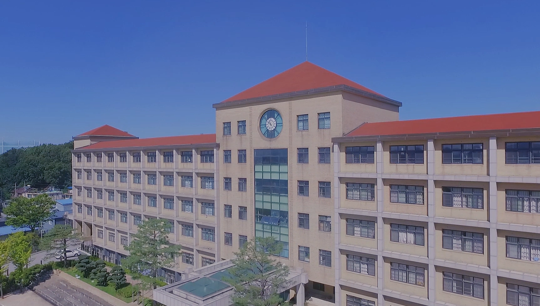 백송고등학교 전경